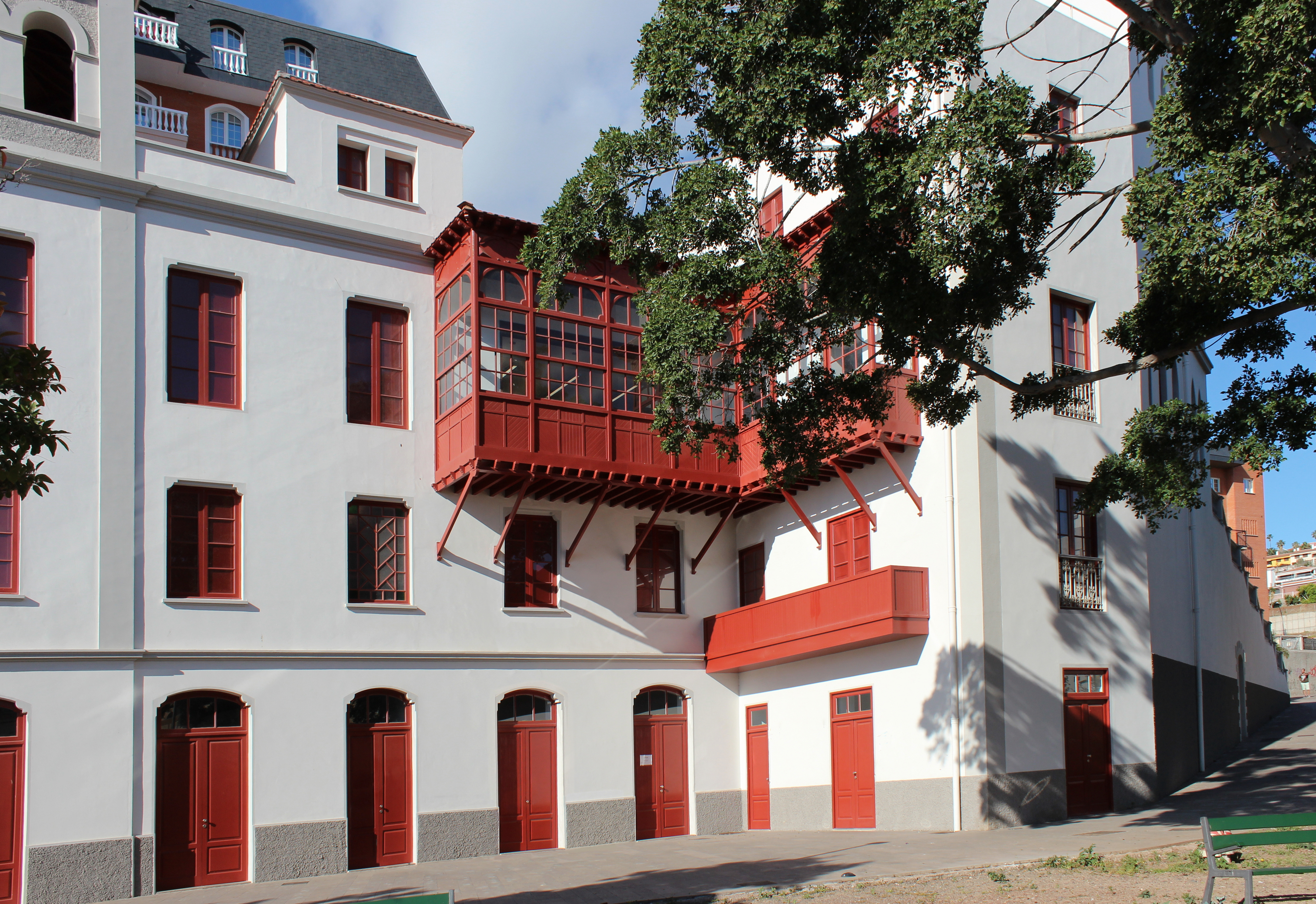 Casa Sixto Machado tras su rehabilitación